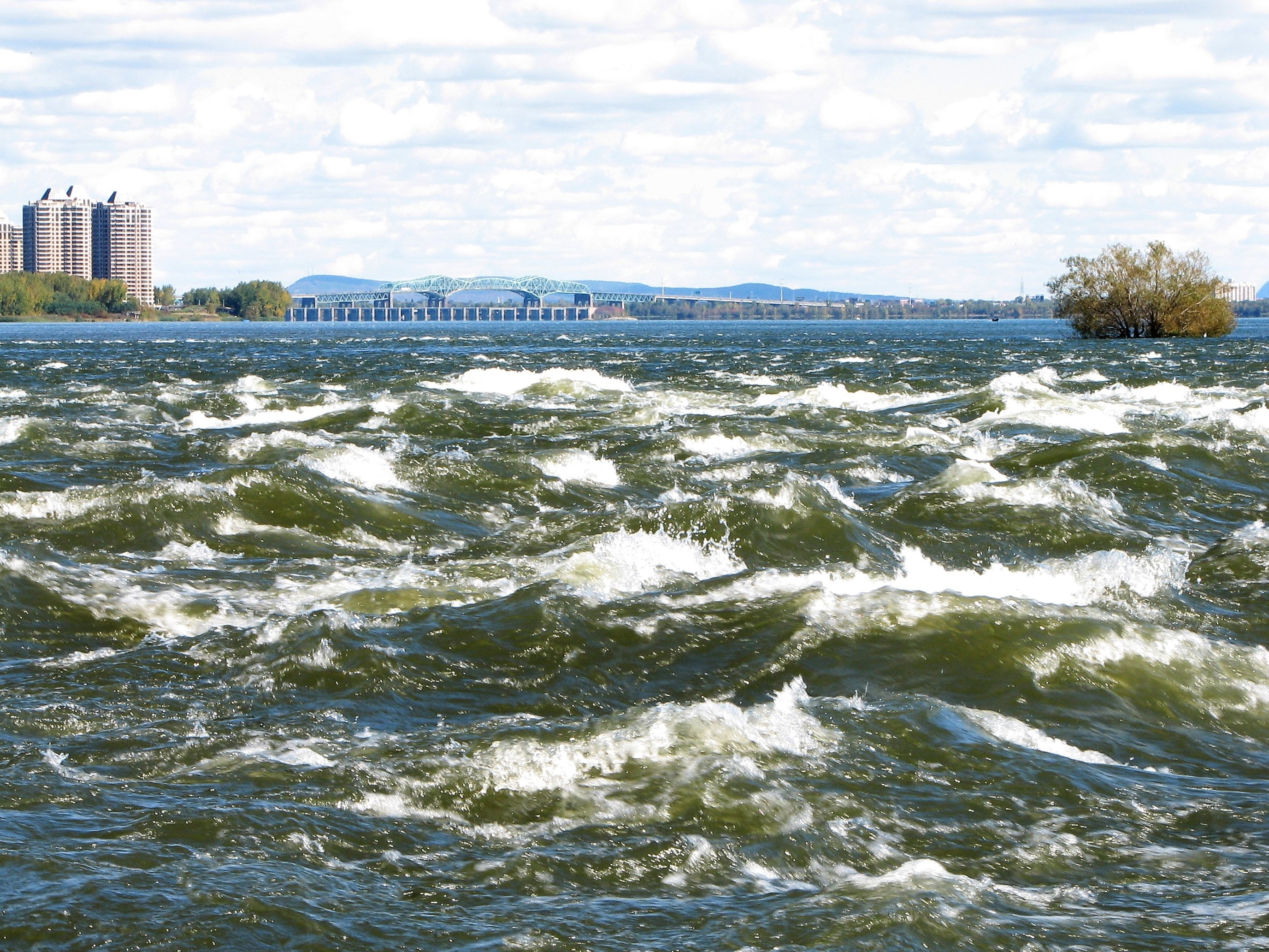 Vue des rapides de Lachine avec le pont Jacques Cartier en fond.